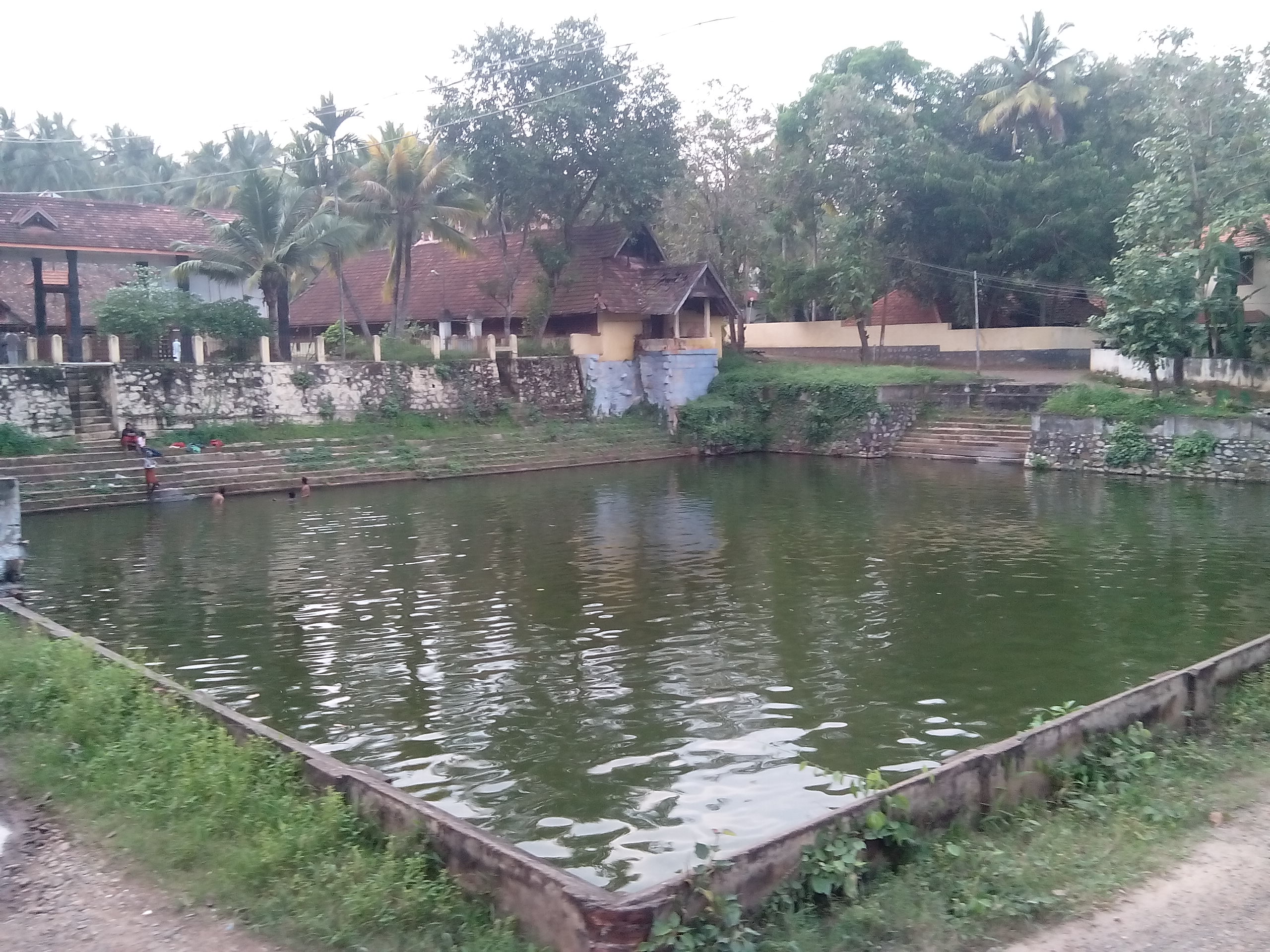 the pond in kochulloor balasubrahmanya temple, thiruvananthapuram